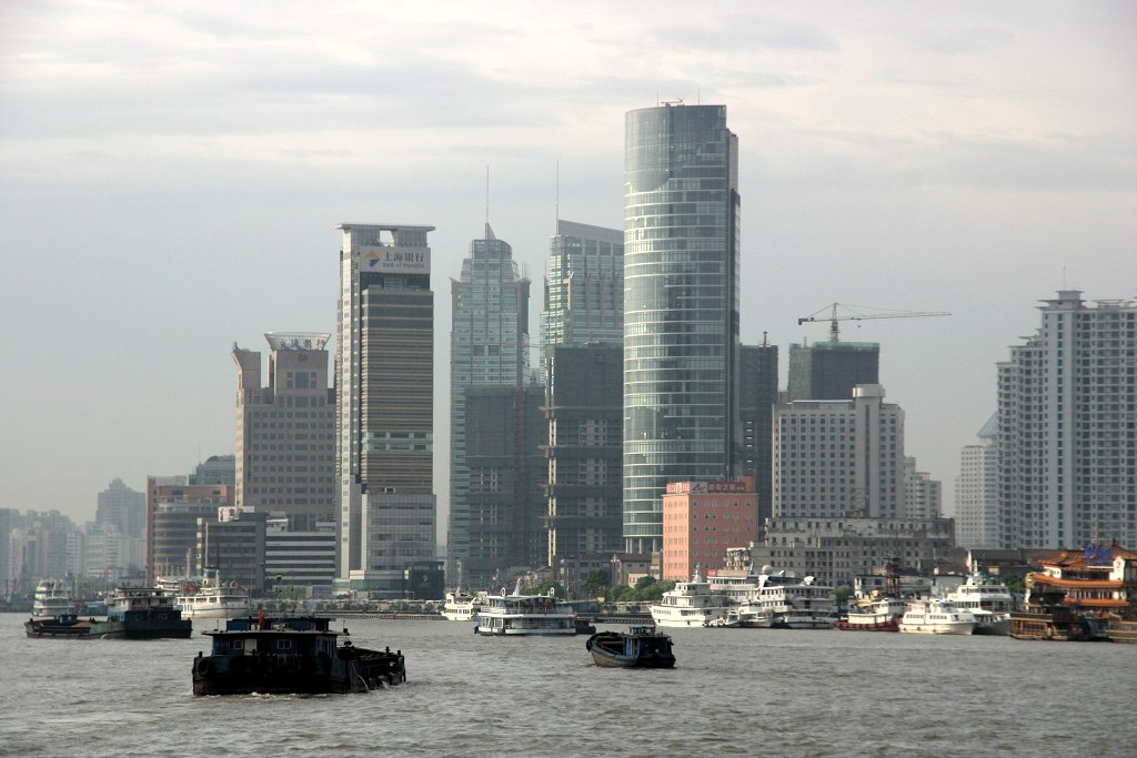 Città di Shanghai in Cina.